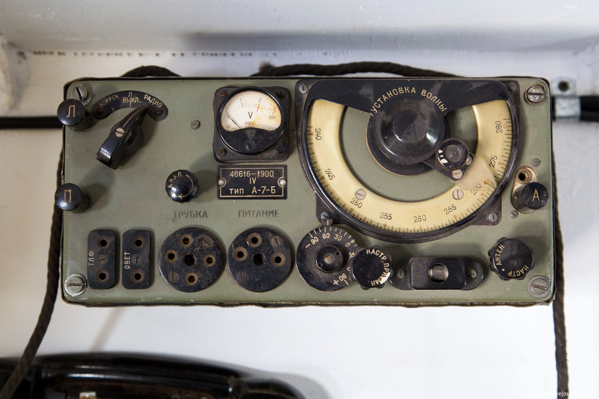 Копия бронекатера БК-73 проекта 1125 времён Великой Отечественной войны. Строительство бронекатера велось на Тольяттинском судоремонтном заводе. Многие использованные детали оригинальные